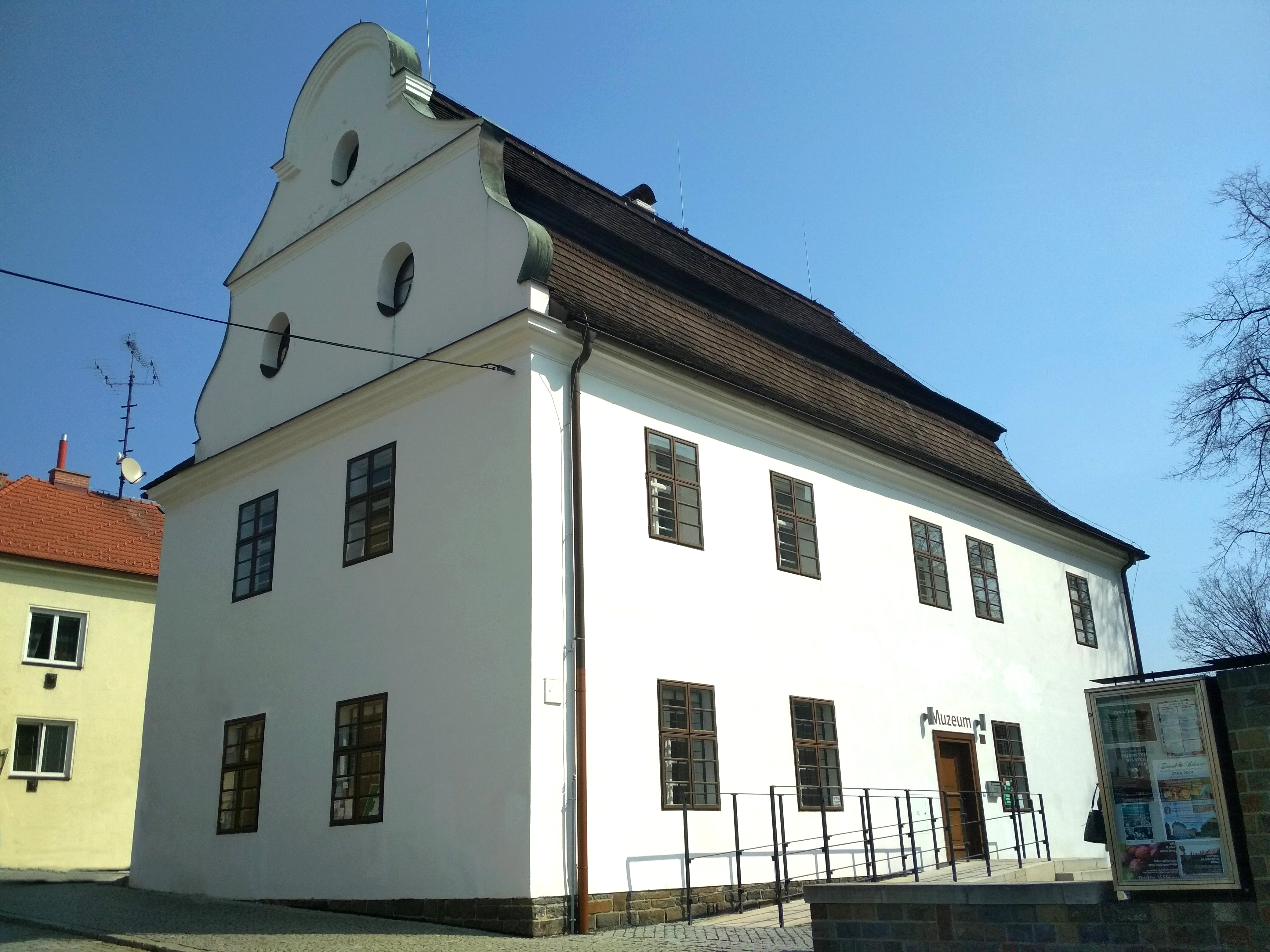 Budova Muzea Bílovec v roce 2014